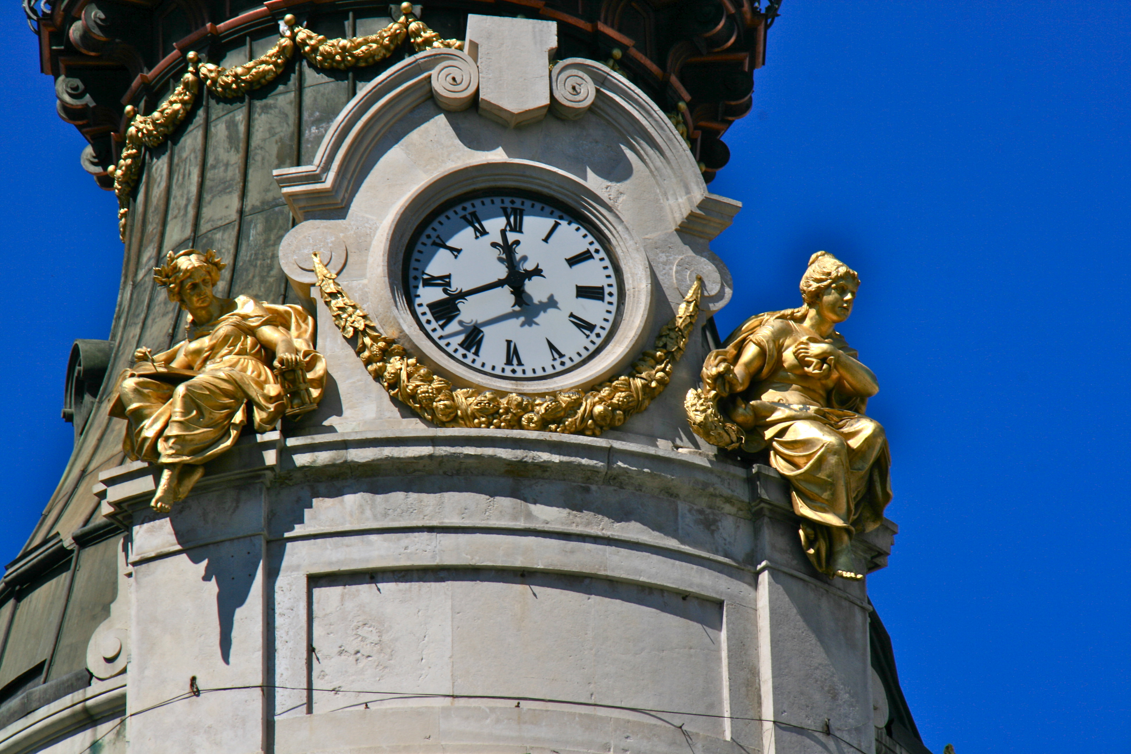 Palacio de la Equitativa - Detalle decorativo.